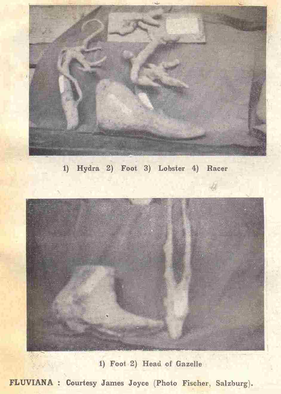 Fluviana Adolph Johannes Fischers "Fluviana" photographs from transition 16/17 (1929). "The river pictures published in this number were discovered by Mr. James Joyce during a visit in Raitenhaslach, Austria, last summer. They represent tree-roots collected by a resident from the mass washed up in the Salzach River. Some of the names he has given these curious formations of nature are: „Serpent which seduced Eve“; „Nine-headed Hydra“; „Seadog“; „Sea-Spider“; „Leech“; „Gazelle-Head“; „Mammoth-Head“; „River Eel“; „Club-Foot“; „Flat-Foot“; „Staff of the Wandering Jew“; „Lizard“; „Sand-Viper“; „Snail“; „Nail of Noah’s Ark“; „Sea-Miss“; „King Serpent with Little Golden Crown“; „Pig’s Ear“; „Pincers“; „Sea-Lobster“. He also collected stone formations washed up in the river and gave them such names as these: „Adam’s Shoe-Last“; „Eve’s Flat Iron“; „Heart (lost in Heidelberg)“; „Stone of the Wise“. They were photographed by Adolph Fischer of Salzburg. (Eugene Jolas: transition 16/17. Glossary (1929).